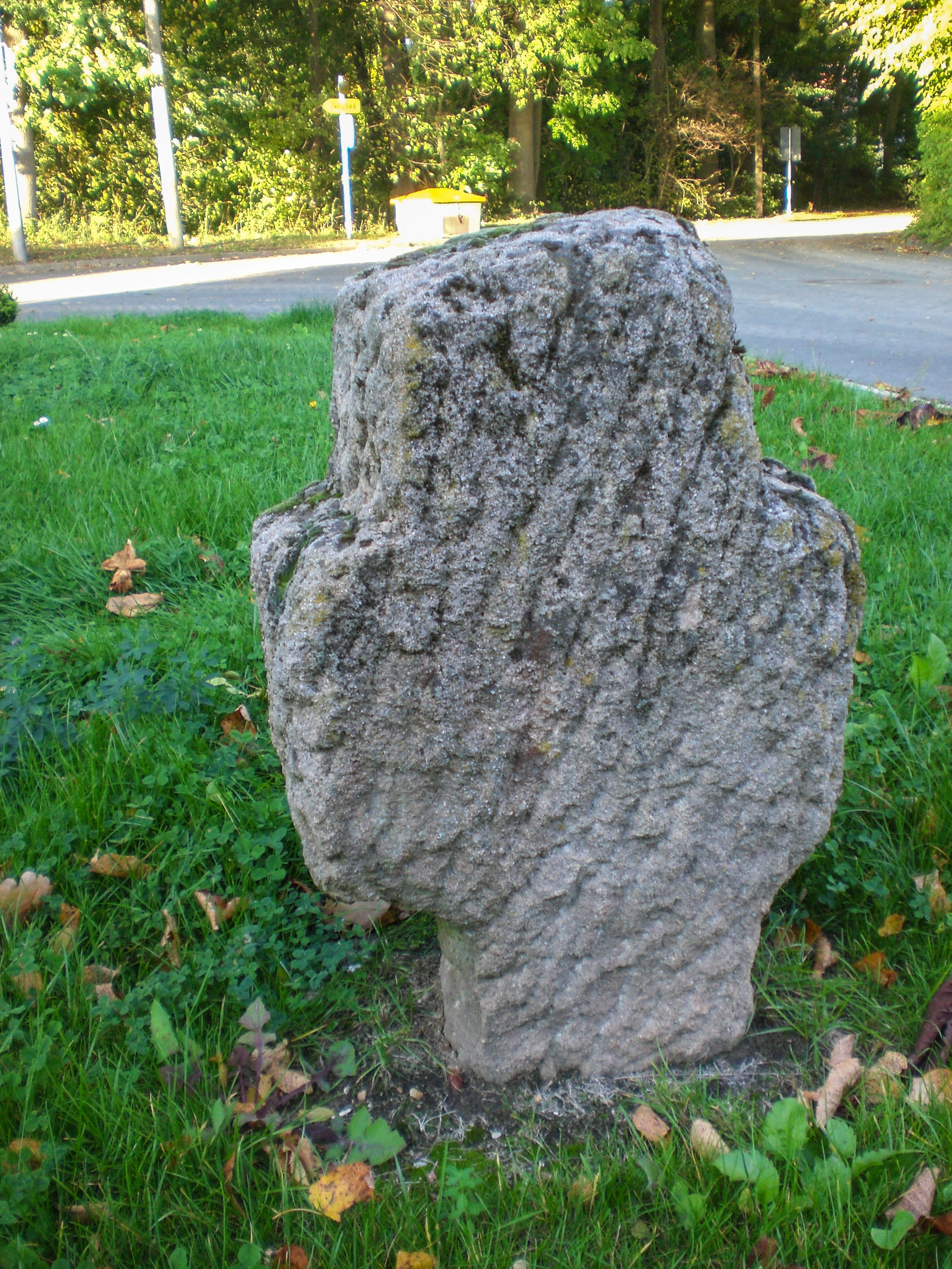 Steinkreuz, Sandstein, wohl spätmittelalterlich